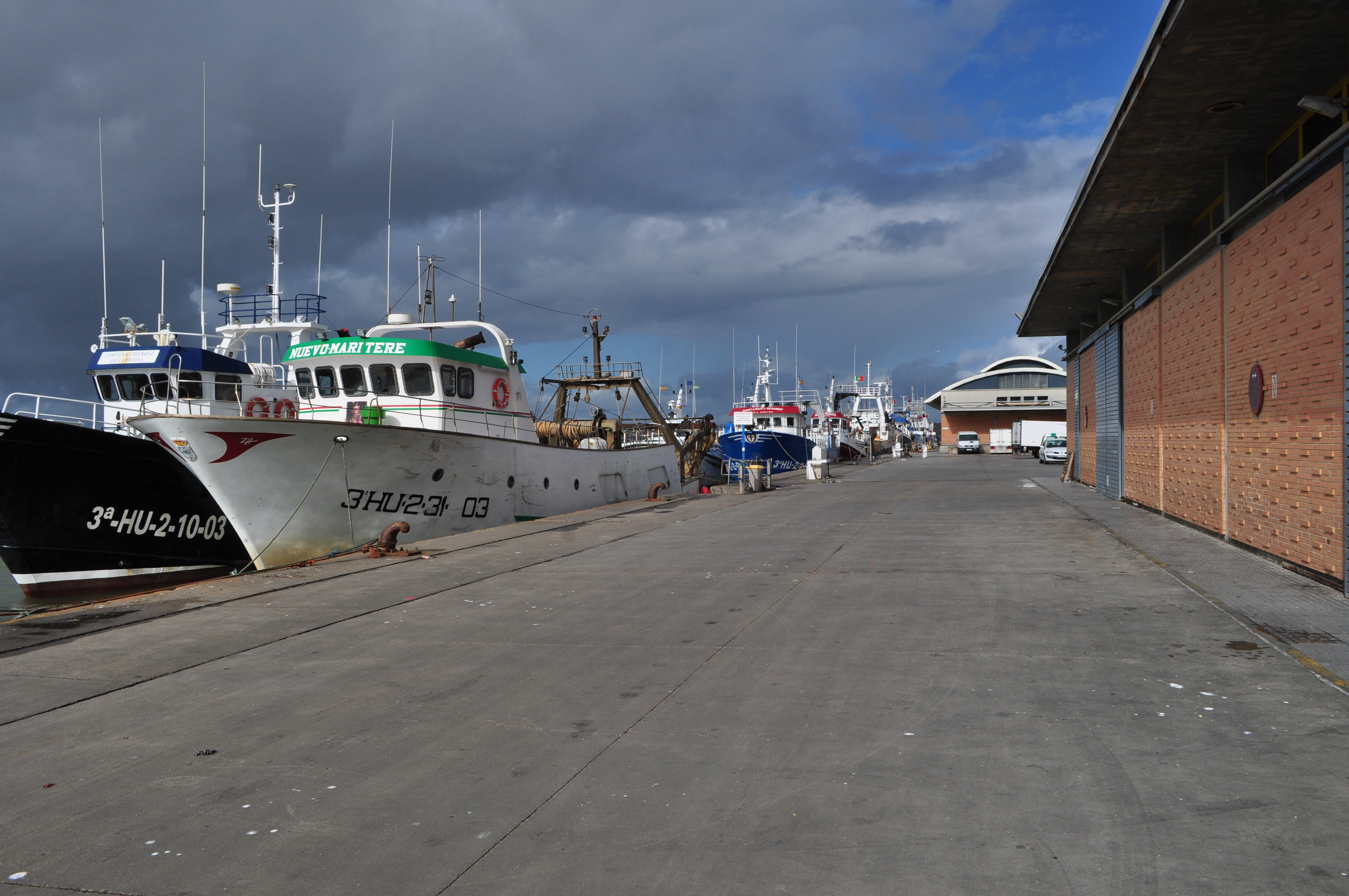 Lonjas del muelle Marina de Isla Cristina